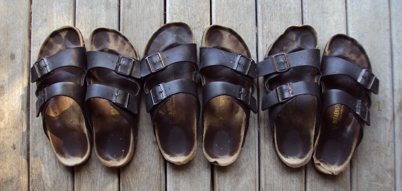 Sommerimpression I